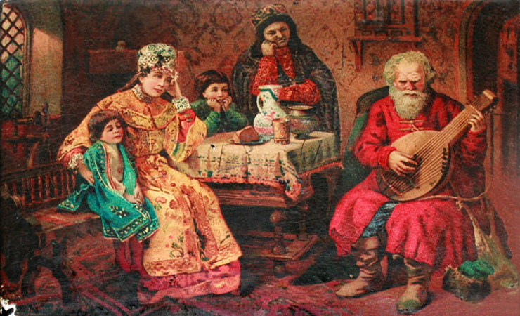 Шкатулка "Певец-сказитель". Папье-маше, роспись, лак. Размер - 10,5х16х5,5 см. Россия, фабрика Лукутина, вторая половина ХIХ века.